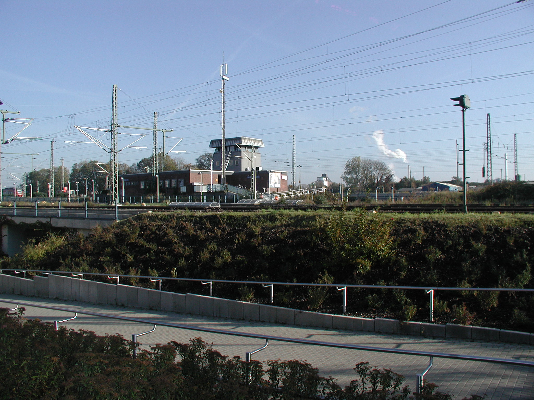 Hürth-Kalscheuren, Bahnhof der Deutschen Bahn AG